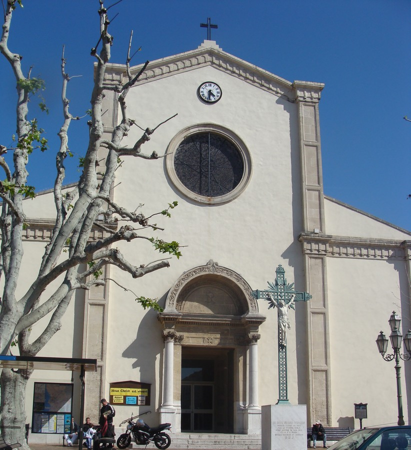 Façade de l'église de Mazargues (Marseille, 9e arr.)